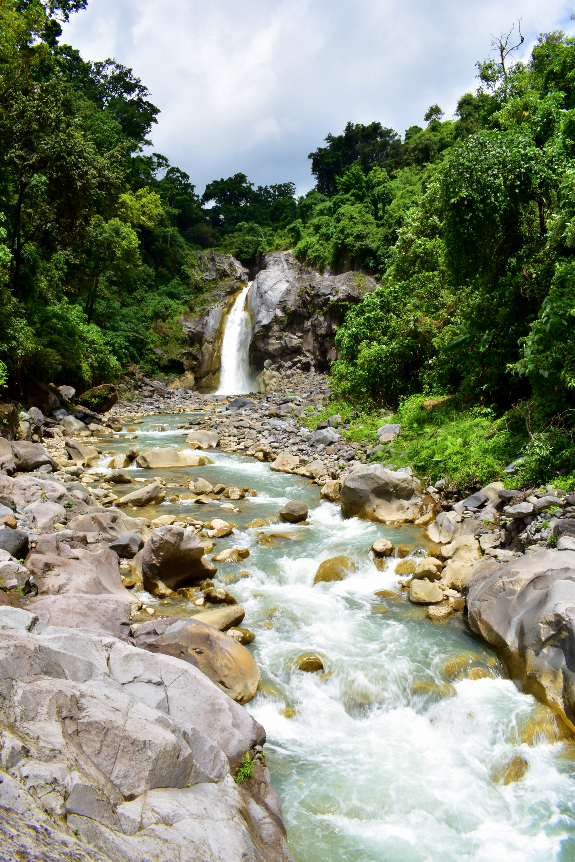 foto potrait dari air terjun mangku sakti yang terletak di desa sajang, kecamatan sembalun, kabupaten lombok timur